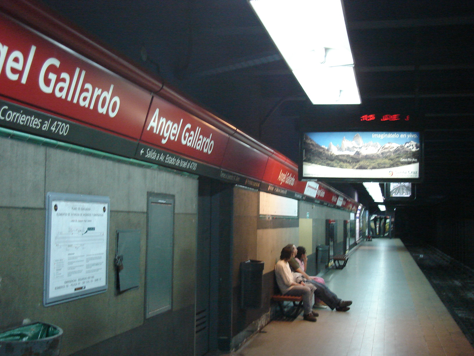 Anden a Leandro N. Alem de la estación Ángel Gallardo de la linea B de subtes de Buenos Aires, Argentina.